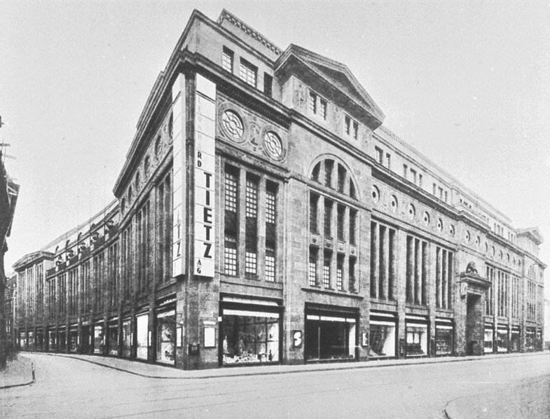 Warenhaus der Leonhard Tietz AG in Köln, Ecke Schildergasse / Hohestraße, erbaut 1912-1914